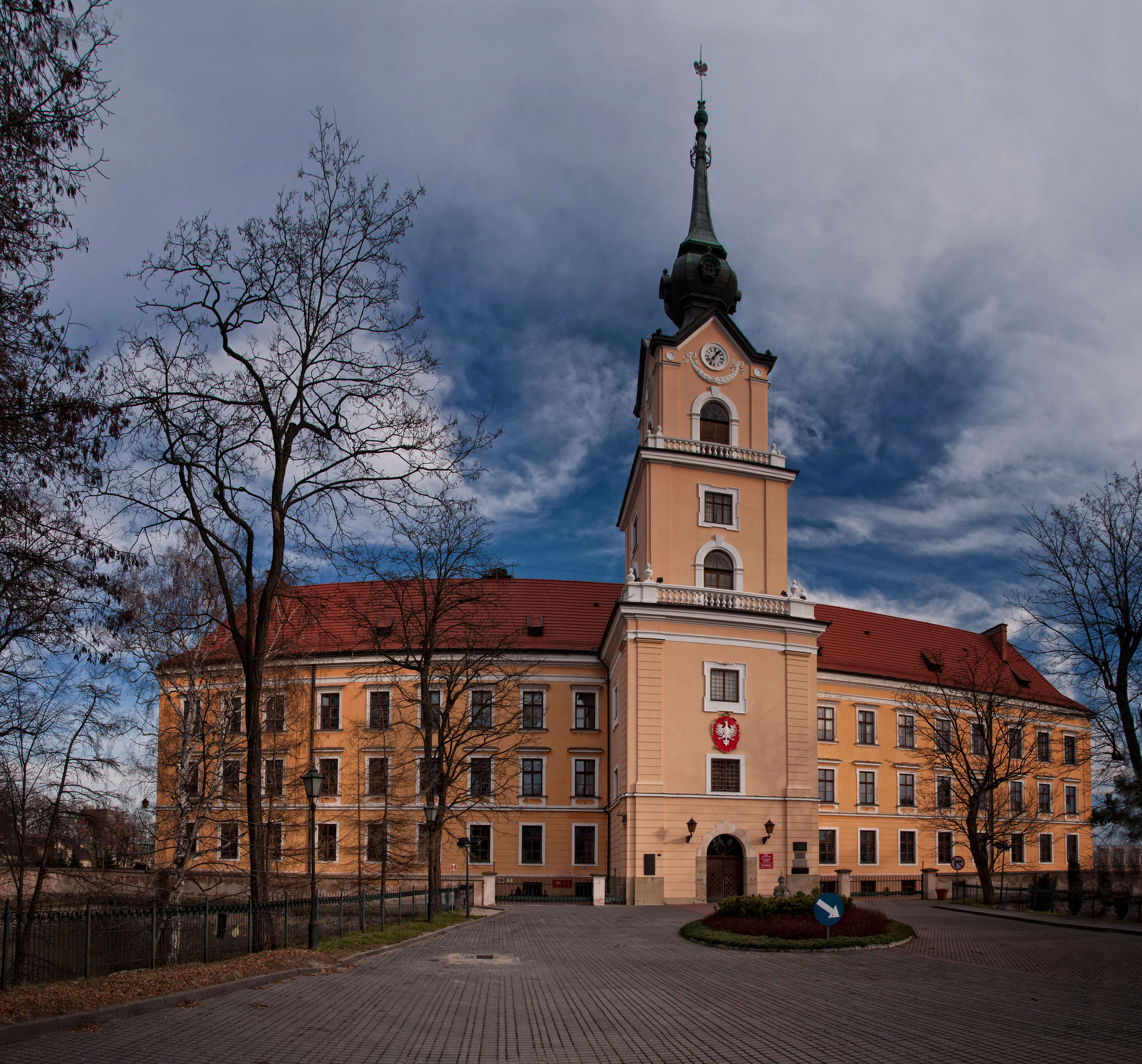 Rzeszów, zamek, 1600, 1903-1906